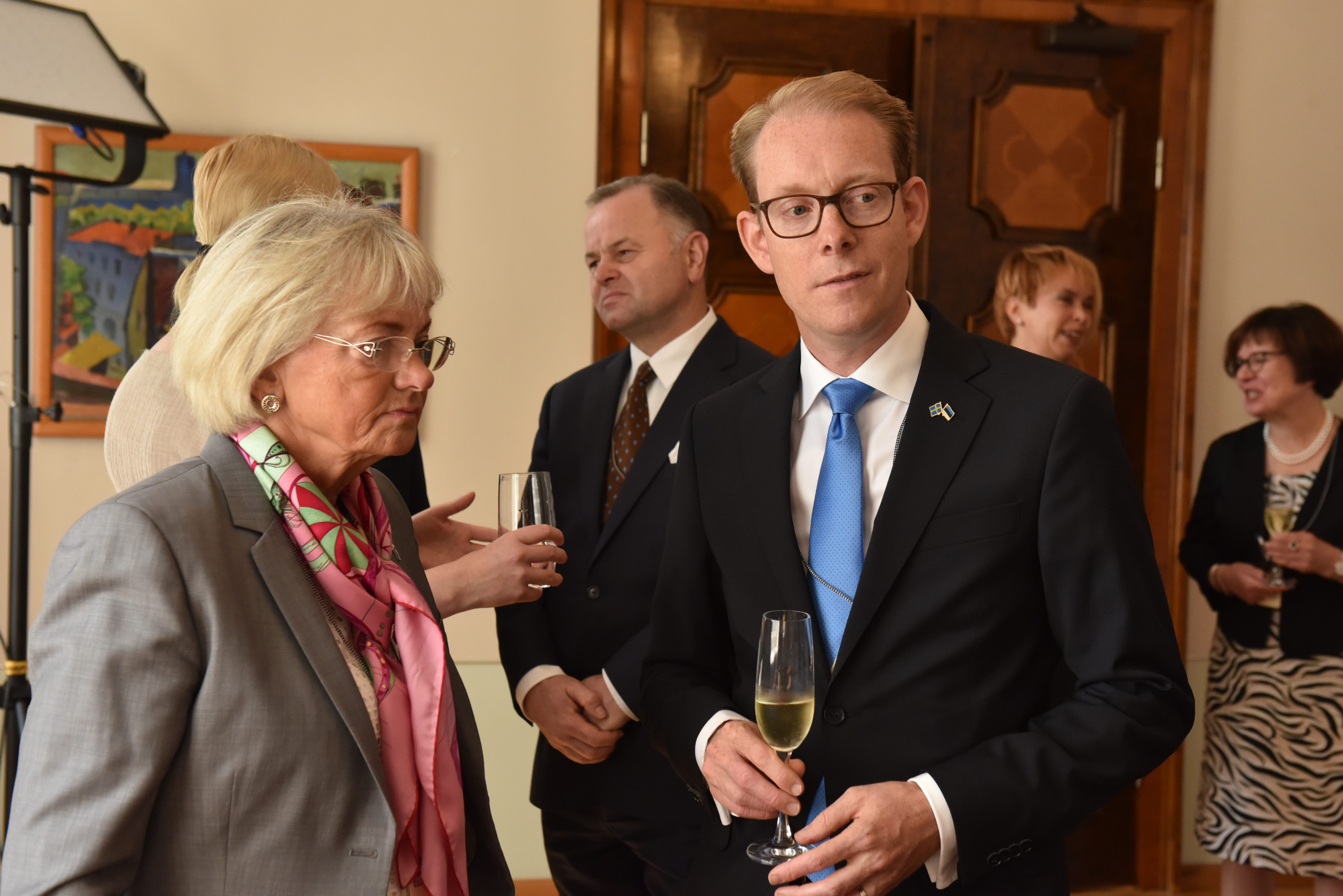 Saeimas priekšsēdētāja Ināra Mūrniece Igaunijas galvaspilsētā Tallinā piedalās svinīgajos pasākumos par godu Igaunijas neatkarības atjaunošanas 25.gadadienai. Tikšanās ar Igaunijas prezidentu Tomasu Hendriku Ilvesu (Toomas Hendrik Ilves).